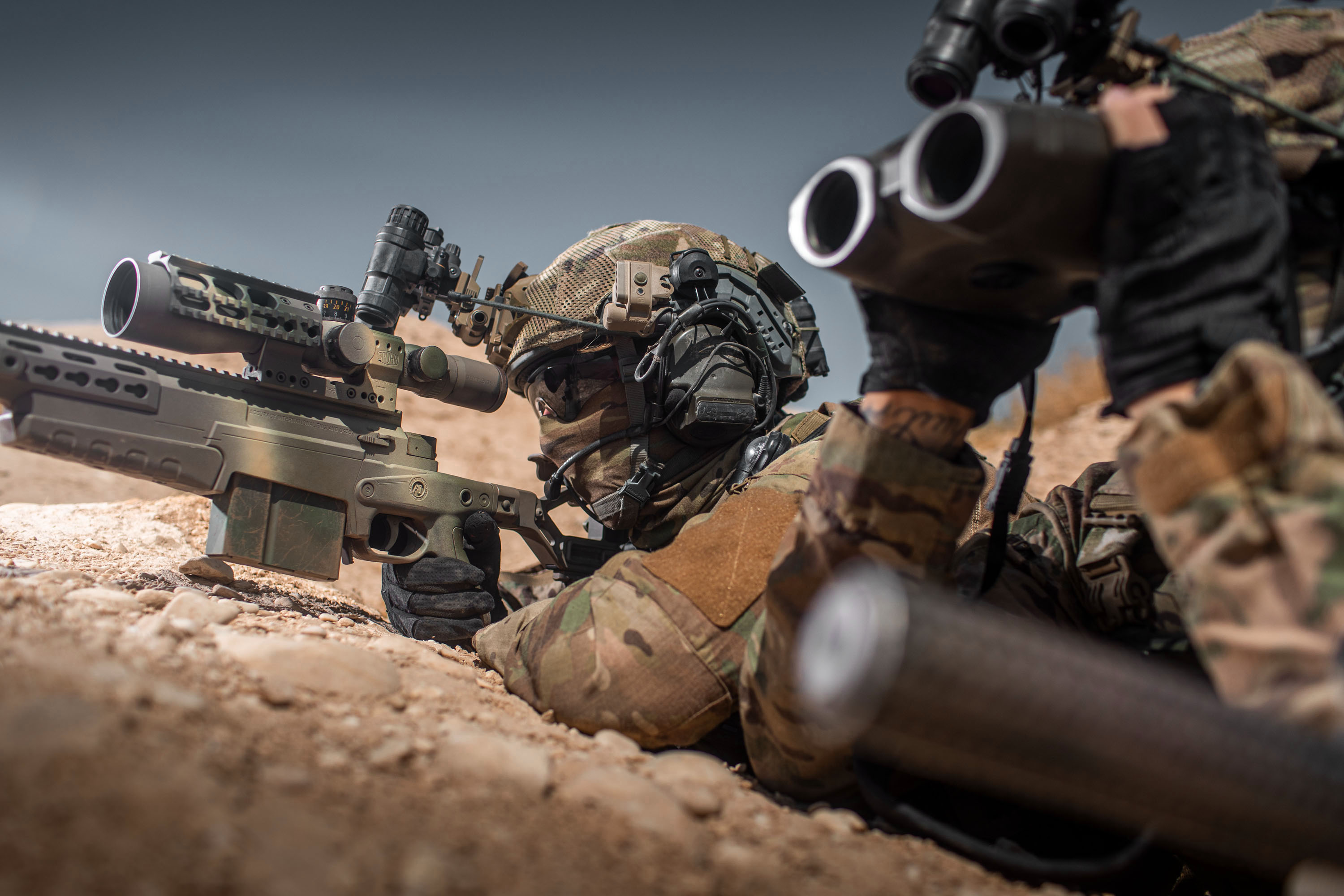 Ontspannen koppen en veel grappen, maar in een oefening of operatie gaat de knop direct om. Het laat de professionaliteit zien van de veelzijdige Maritime Special Operations Forces (MARSOF)-operators. De mannen van de Afghan Territorial Force 888 mogen blij zijn met deze toptrainers. Andersom leren de Nederlandse special forces ook van de Afghanen. De maritieme special forces maken deel uit van het Special Operations Advisory Team (SOAT) dat de Afghanen binnen NAVO-missie Resolute Support de kneepjes van het SF-vak bijbrengt. ATF 888, actief in het noorden van Afghanistan, is een van de triple units, de speciale politie-eenheden van de Afghaanse overheid. Het Korps Commandotroepen (KCT) zette vorig jaar het trainingsprogramma op vanuit Camp Marmal bij Mazar-e-Sharif. De vierde rotatie is voor MARSOF. Het doel? Over 2 jaar moeten de Afghanen zelfstandig, met een helikopter of auto ergens heen verplaatsen. Maar ook hun eigen veiligheid waarborgen, een instap maken en iemand oppakken, die betrokken is bij terreur, drugshandel of zware criminaliteit.